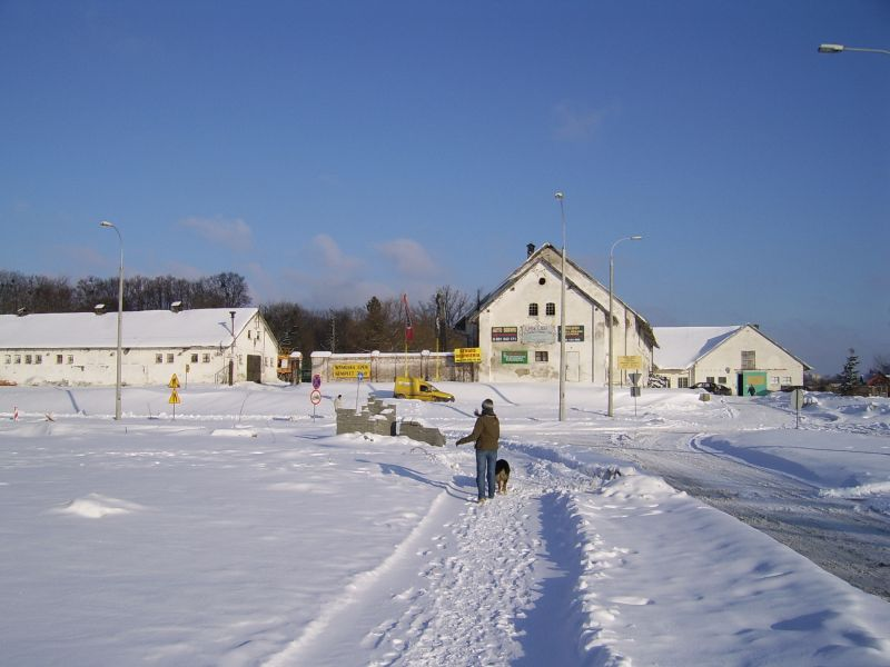 Olsztyn (Pozorty) - ZPD UWM